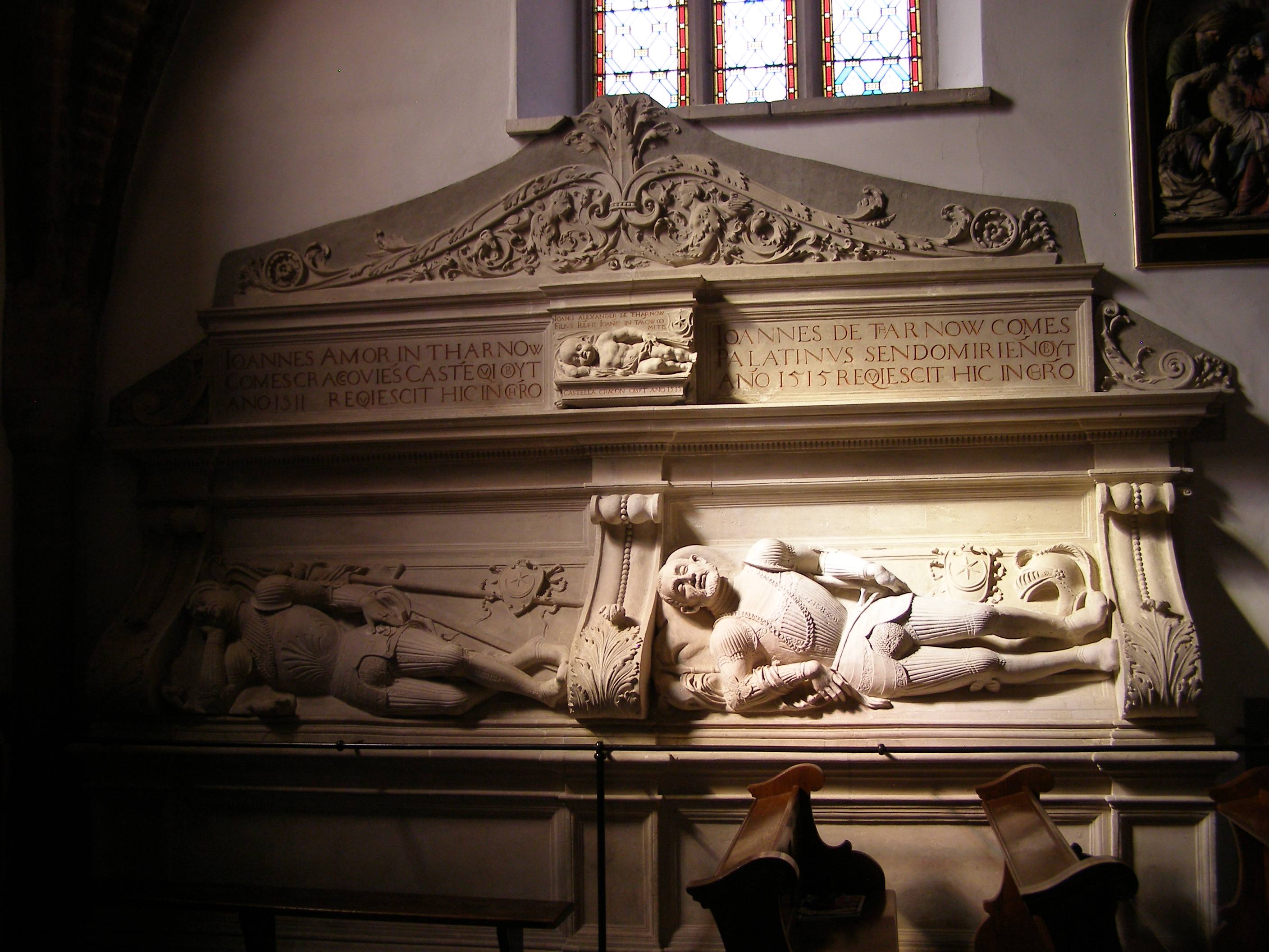 Tarnów - katedra Narodzenia NMP, nagrobek Jana Amora Iuniora Tarnowskiego